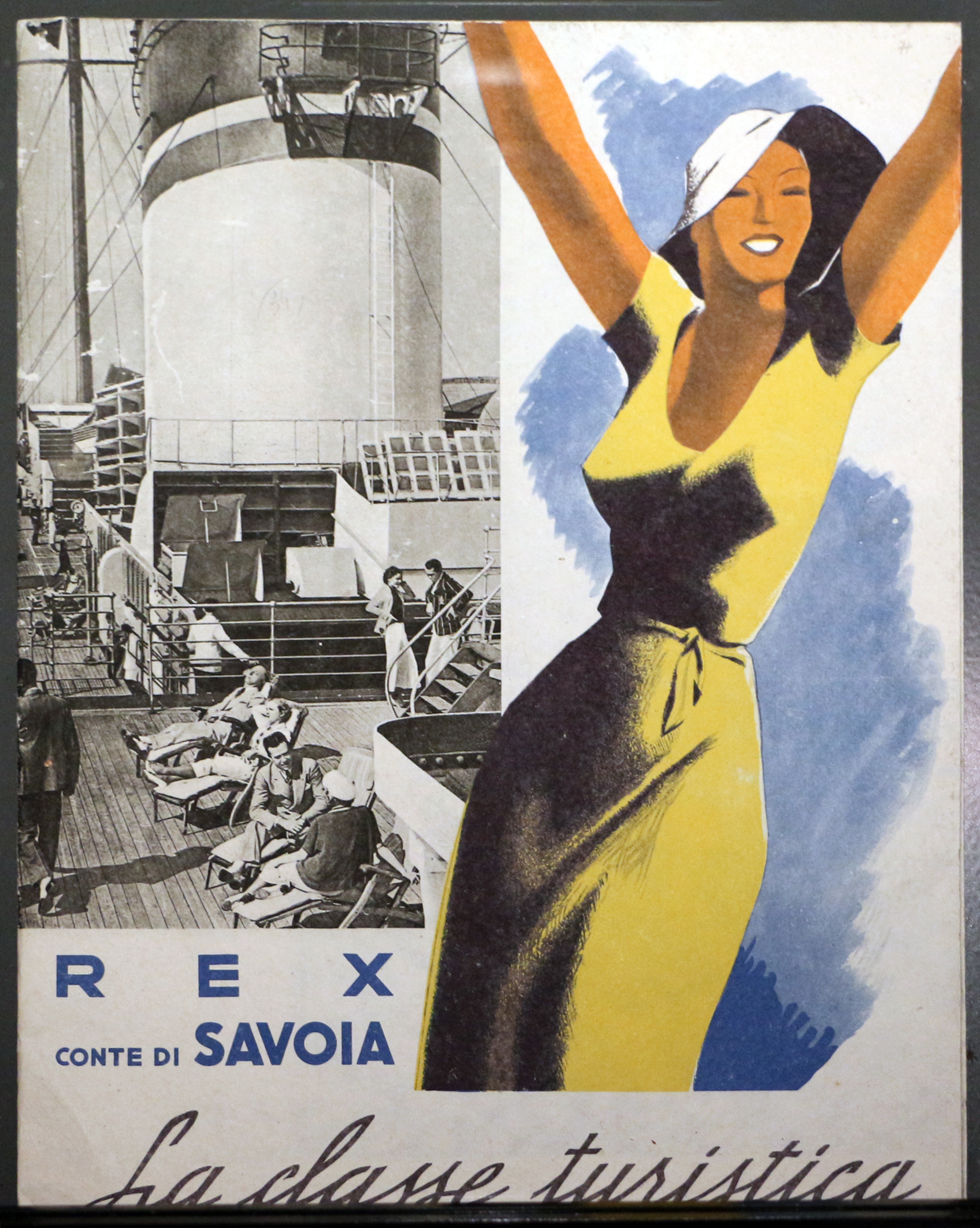 Il parco e i musei di Nervi This is a photo of a monument which is part of cultural heritage of Italy.